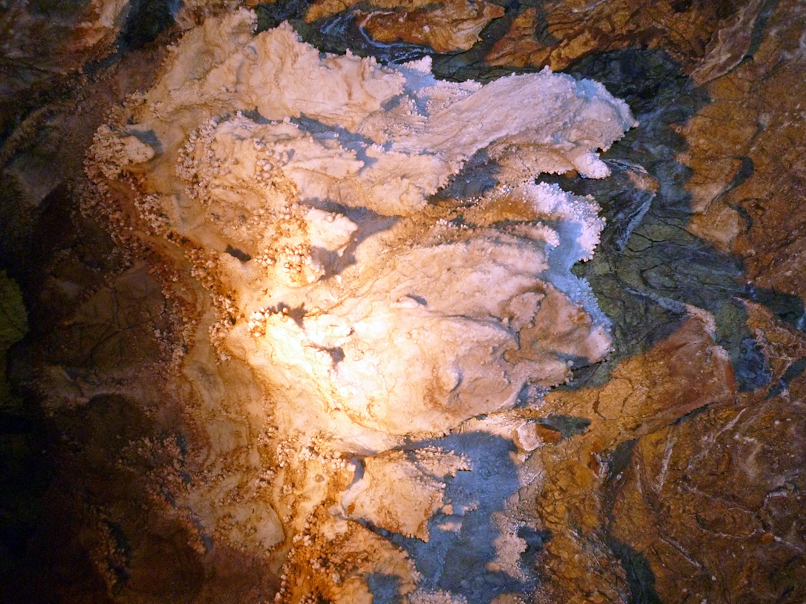 Kubacher Kristallhöhle